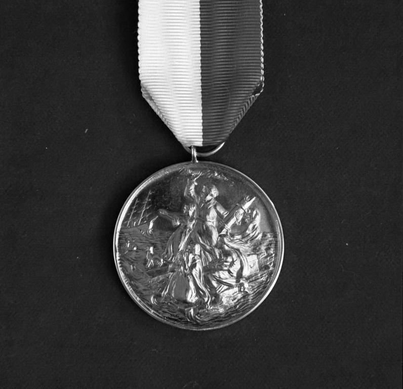 Orden im Besitz von Bundespräsident Walter Scheel Medaille für Rettung aus Seenot